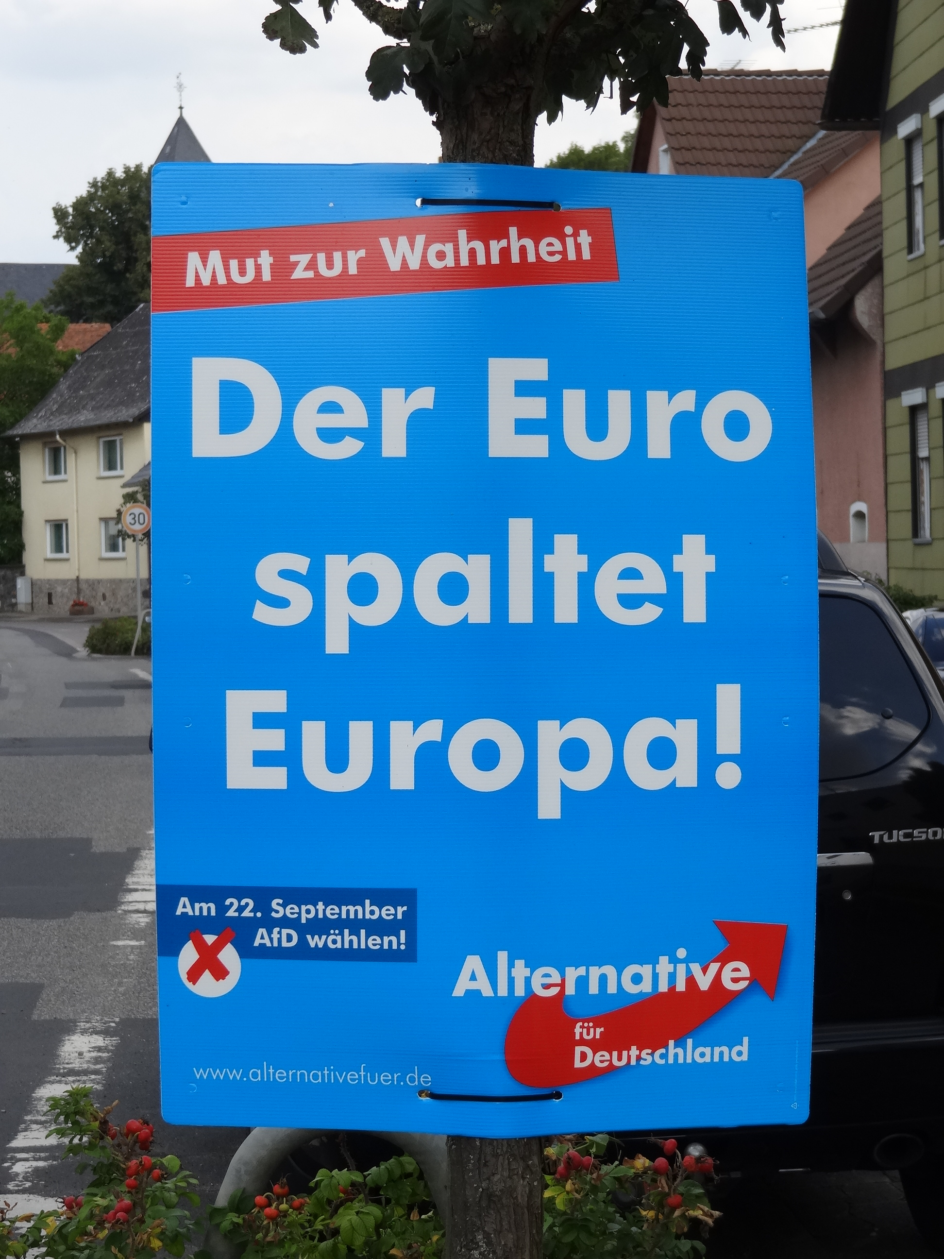 Wahlplakat 2013 (nur Text)